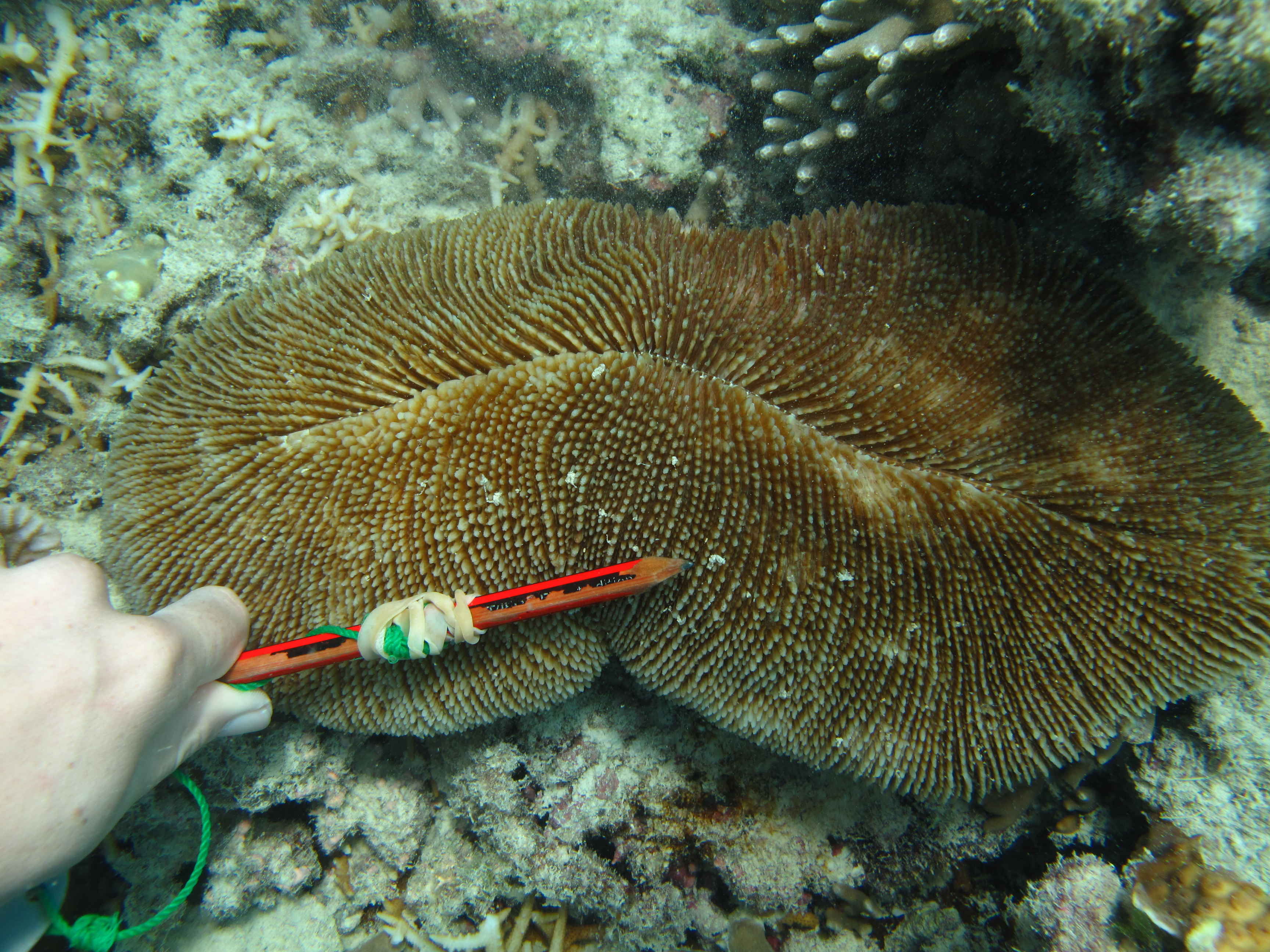 Ctenactis echinata en isla Poruma, Estrecho de Torres, Australia